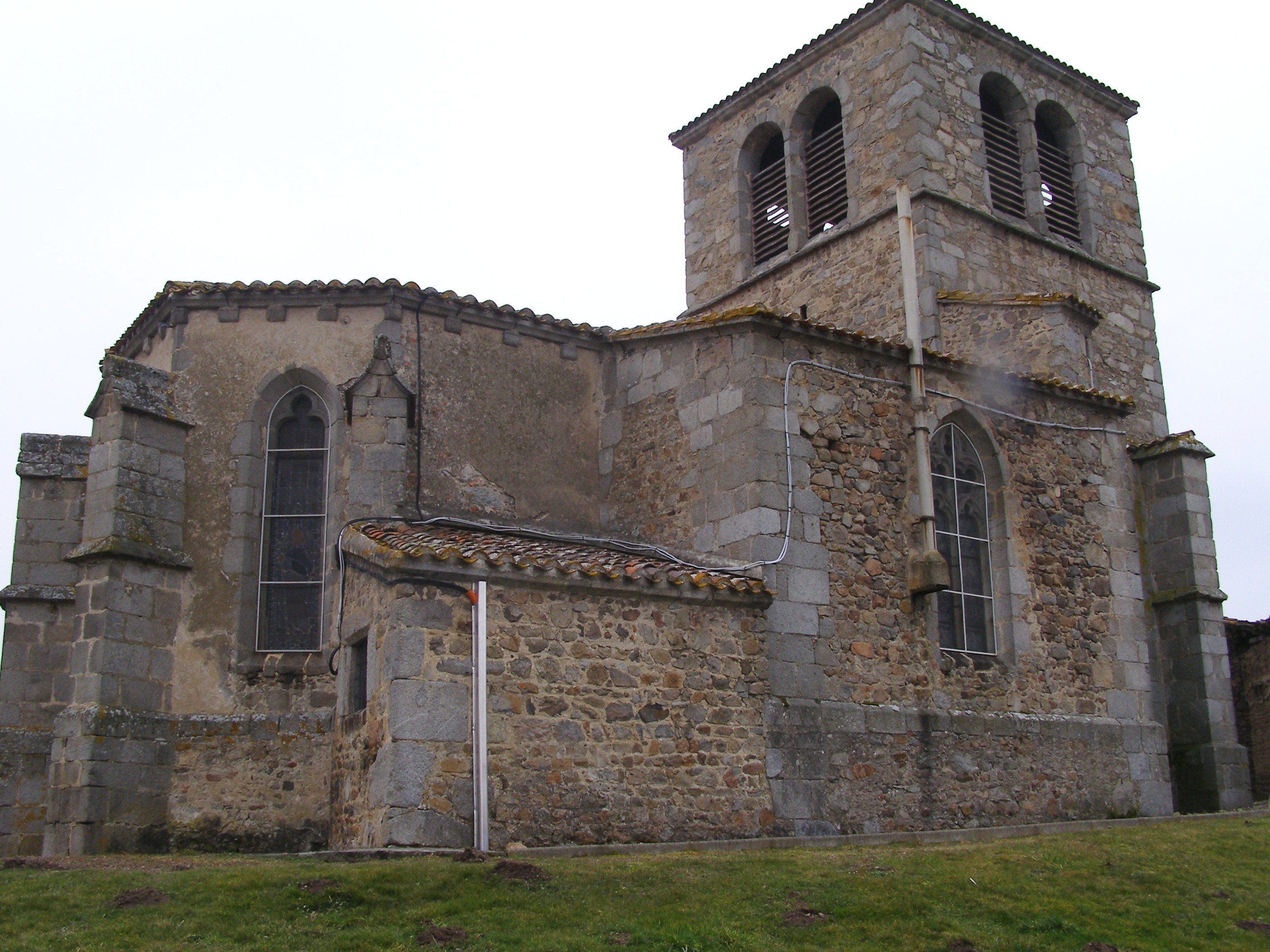 Eglise Saint Pierre (apôtre), côté latéral